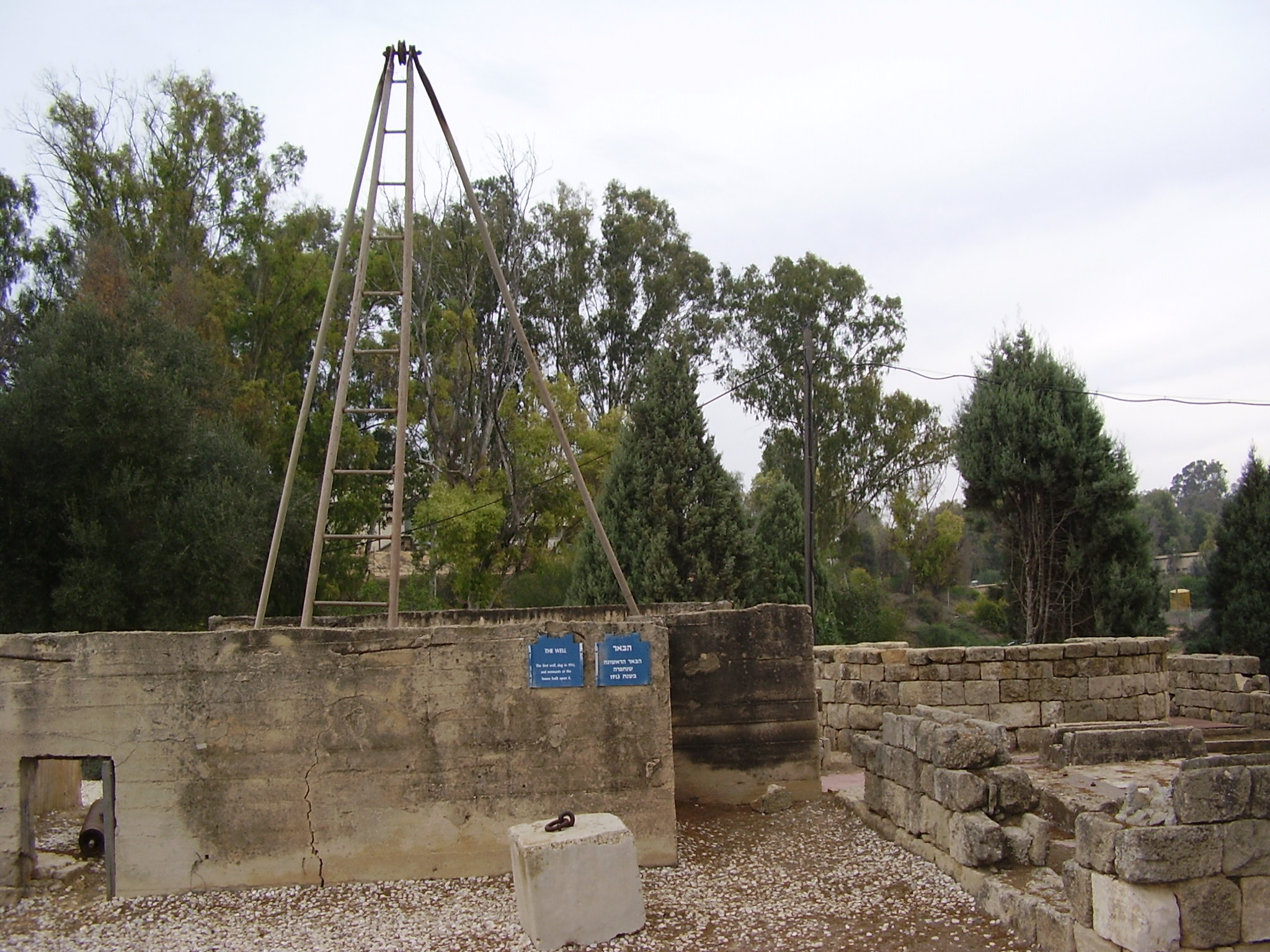 הבאר (1913) באתר הראשונים בנגב בקיבוץ רוחמה רישיון נוצר על ידי משתמש:Avi1111